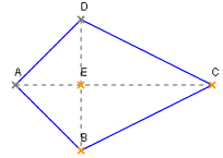 Bild-Beschreibung Beschreibung: Darstellung zur Verdeutlichung der Begriffe bei einer Drachenvierecks (mit allen Seiten und Diagonalen) Quelle: Selbstgezeichnet mit Geonext Fotograf oder Zeichner: BirgitLachner Andere Versionen: - Lizenzstatus: GNU FDL 07:10, 11. Feb 2003 BirgitLachner 204 x 145 (6653 Byte) (Drachenviereck mit allen Seiten und Diagonalen)